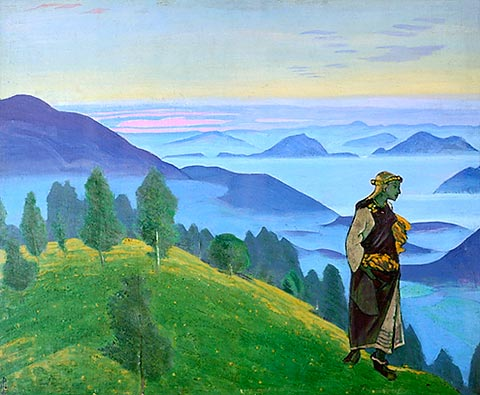 Daughter of viking. «Дочь викинга». Н.К. Рерих. Государственный музей Востока. Москва